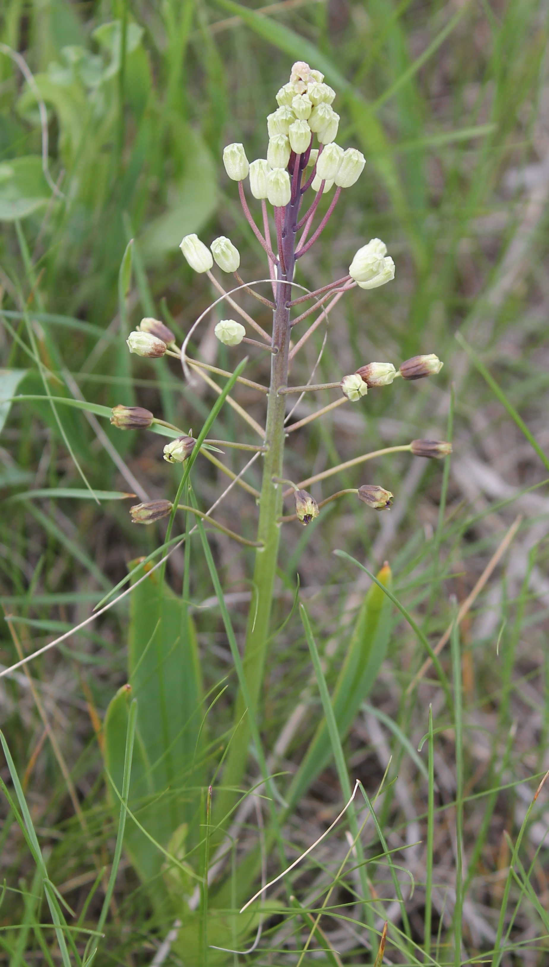 Белевалія сарматська в період цвітіння. Україна, Дніпропетровська область, Криворізький район.